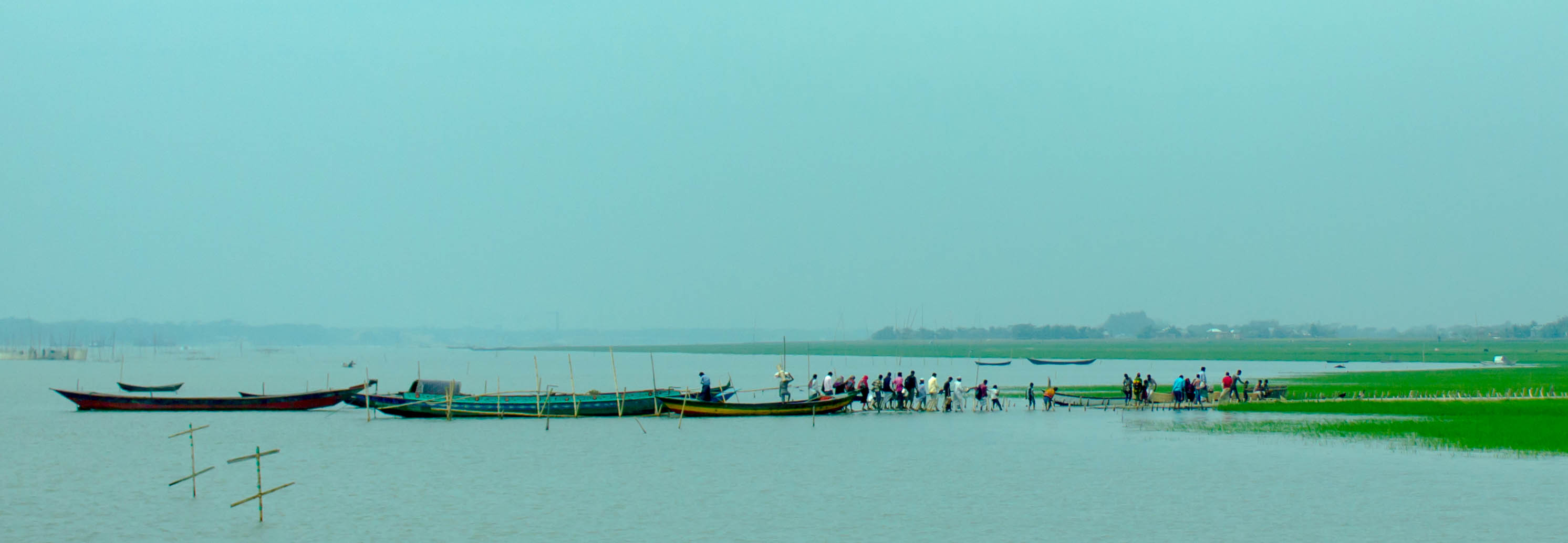 IMG_9208.jpg Barguna, Barisal Division, Bangladesh